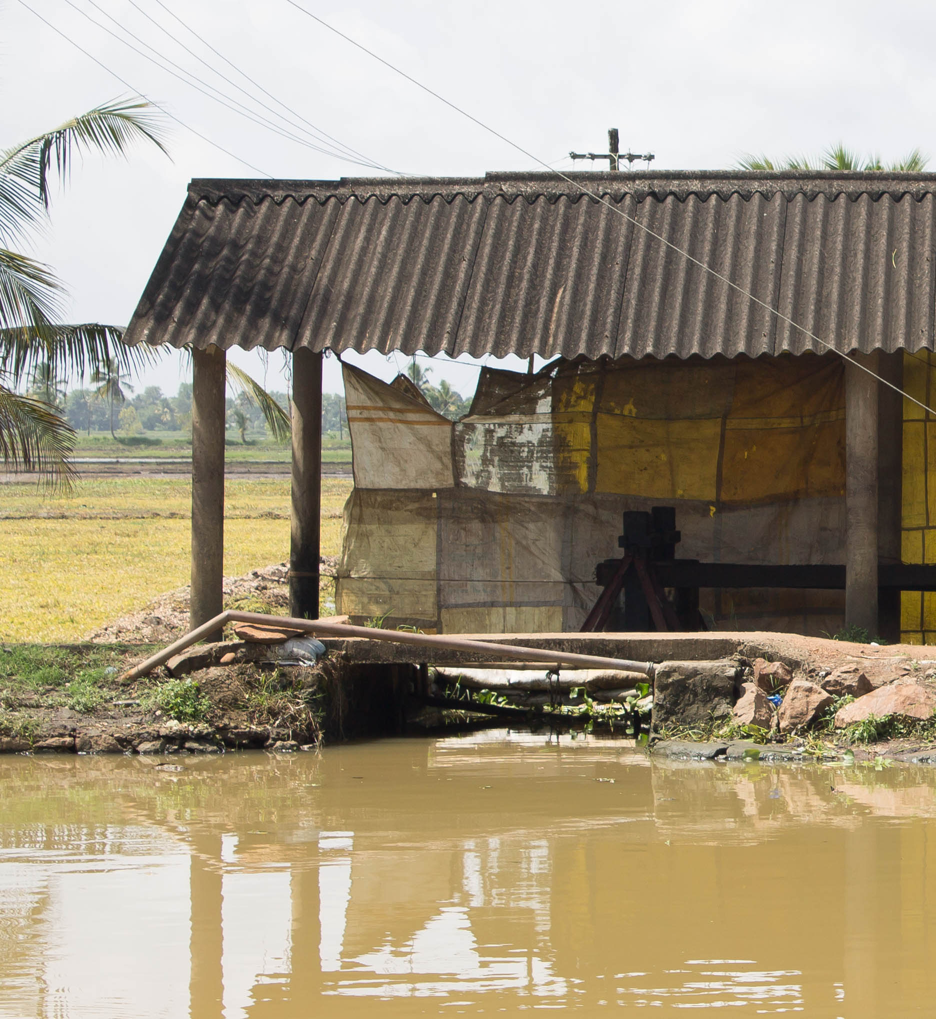 ആലപ്പുഴയിലെ ദൃശ്യം